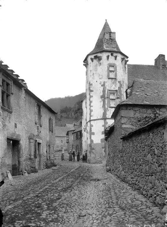 Imatge